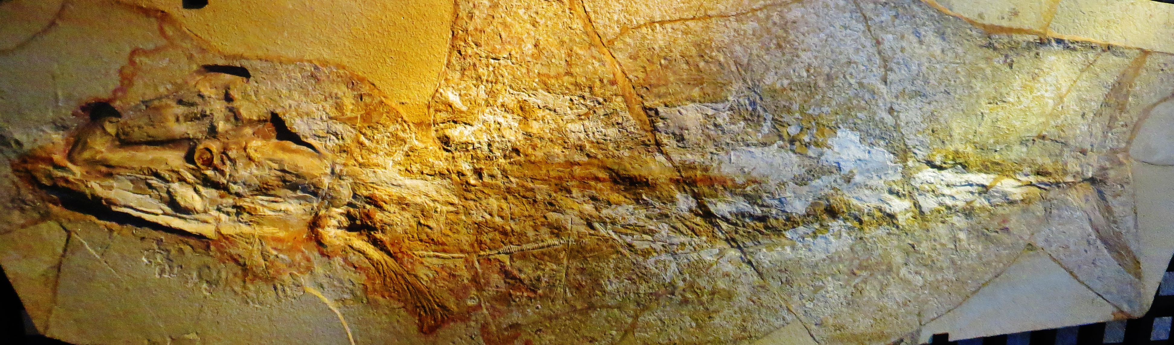 Took the picture at Jura-Museum, Eichstaett